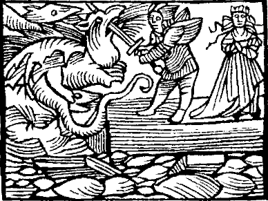 Hie ficht der Hürnen Seyfrid auff dem stayn mit dem Trachen.